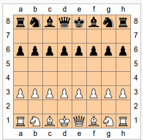 Tabuleiro de Makruk